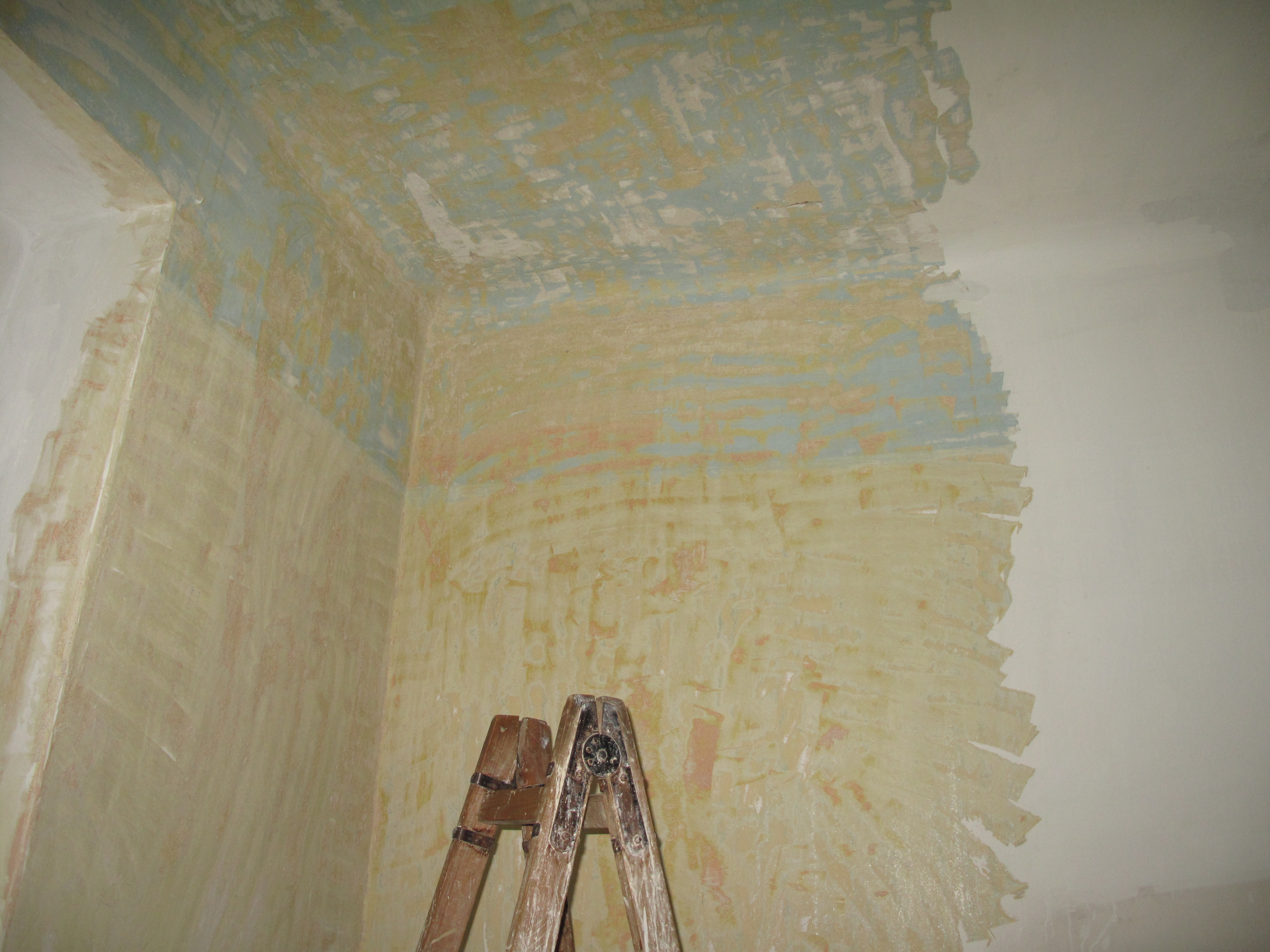 Původní barvy odhalené škrabáním. Praha, Česká republika.